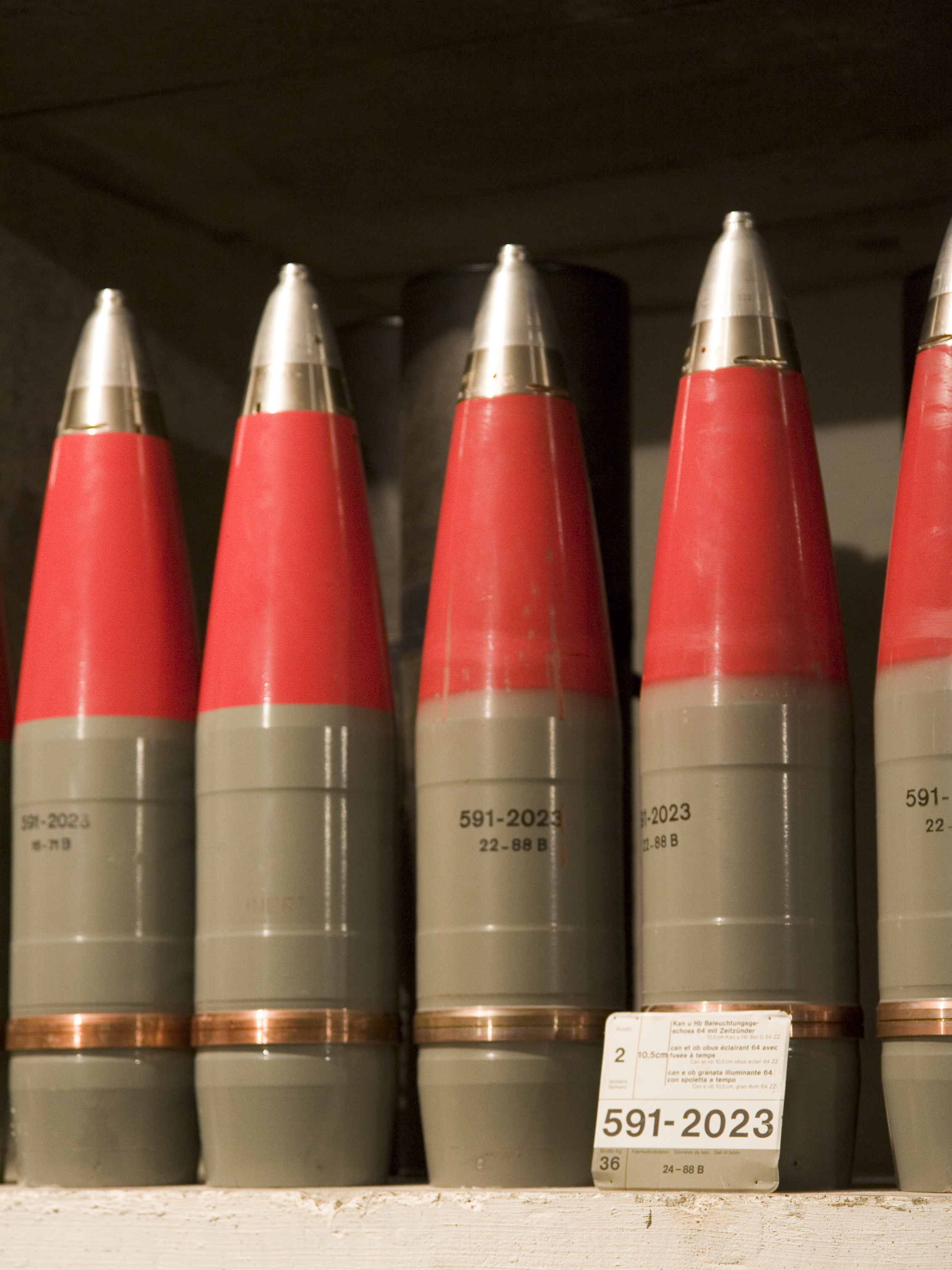 Kanonen- und Haubitzen-Beleuchtungsgeschoss 64 10.5 cm mit Zeitzünder